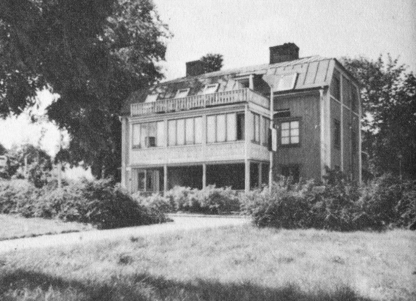 Smedslättens gård efter renoveringen på 1960-talet